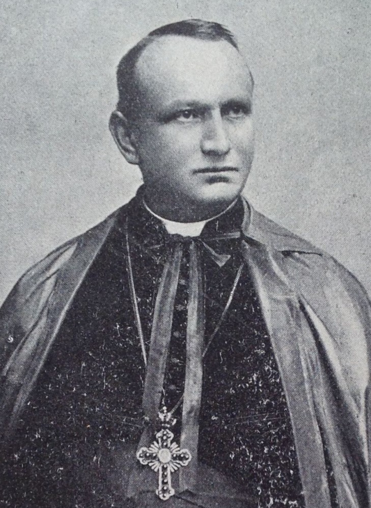 Josef Binder (1847-1911), český římskokatolický kněz německého původu a kanovník Metropolitní kapituly u sv. Víta v Praze